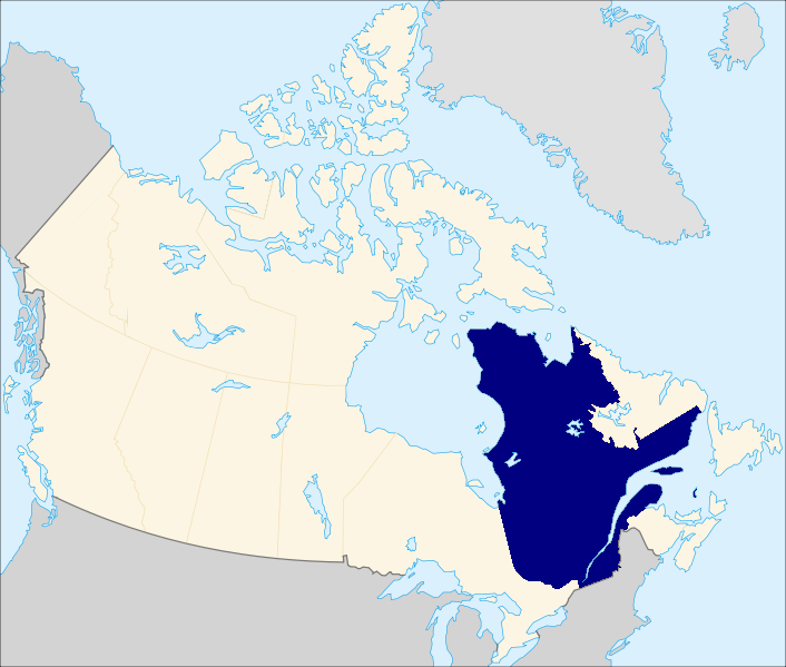 Localisation du Québec en Amérique du Nord.